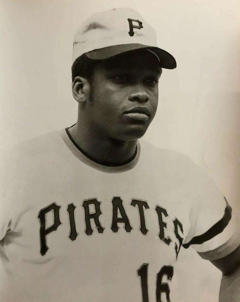 Al Oliver en uniforme des Pittsburgh Pirates